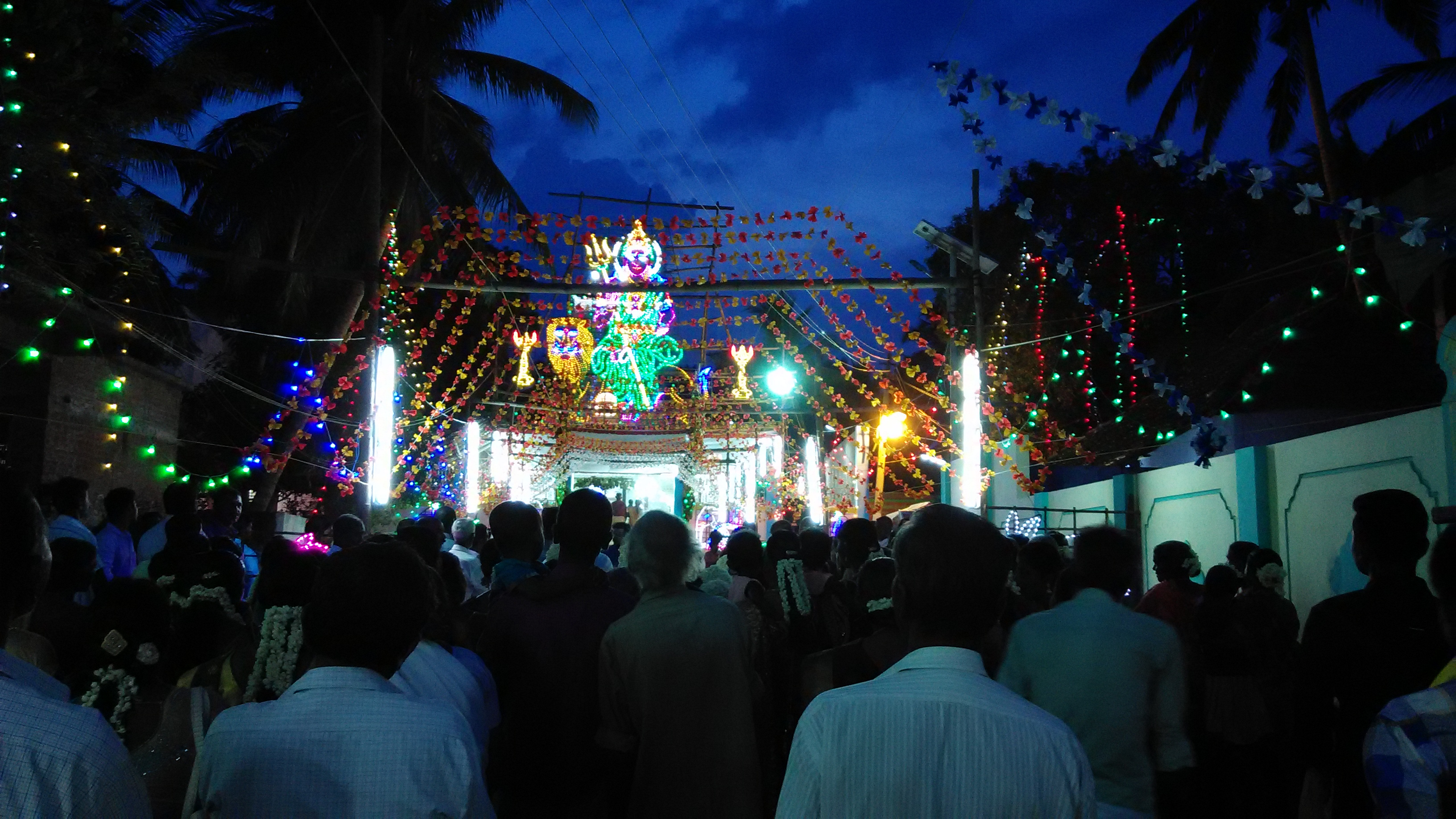 சனிக்கிழமை மாலை, சித்திரை திருவிழா.